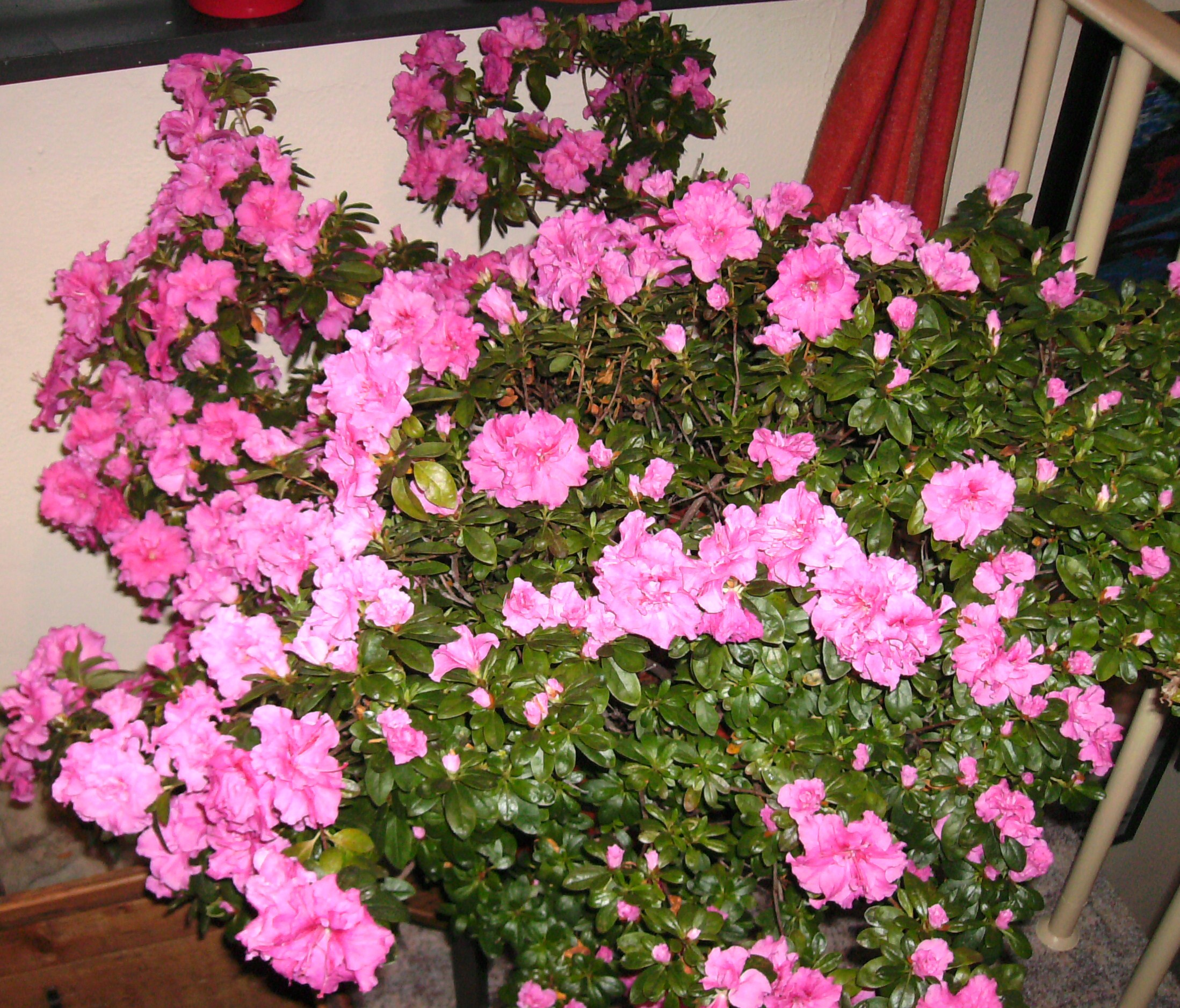 Zimmer-Azalee